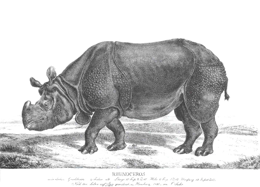 Das Panzernashorn von Jacques und Philippine Tourniaire 1820 Privatsammlung